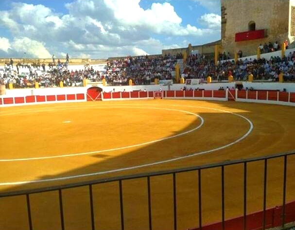 Imagen realizada antes del inicio del paseíllo de la plaza el día del festival taurino del 30 de marzo de 2019